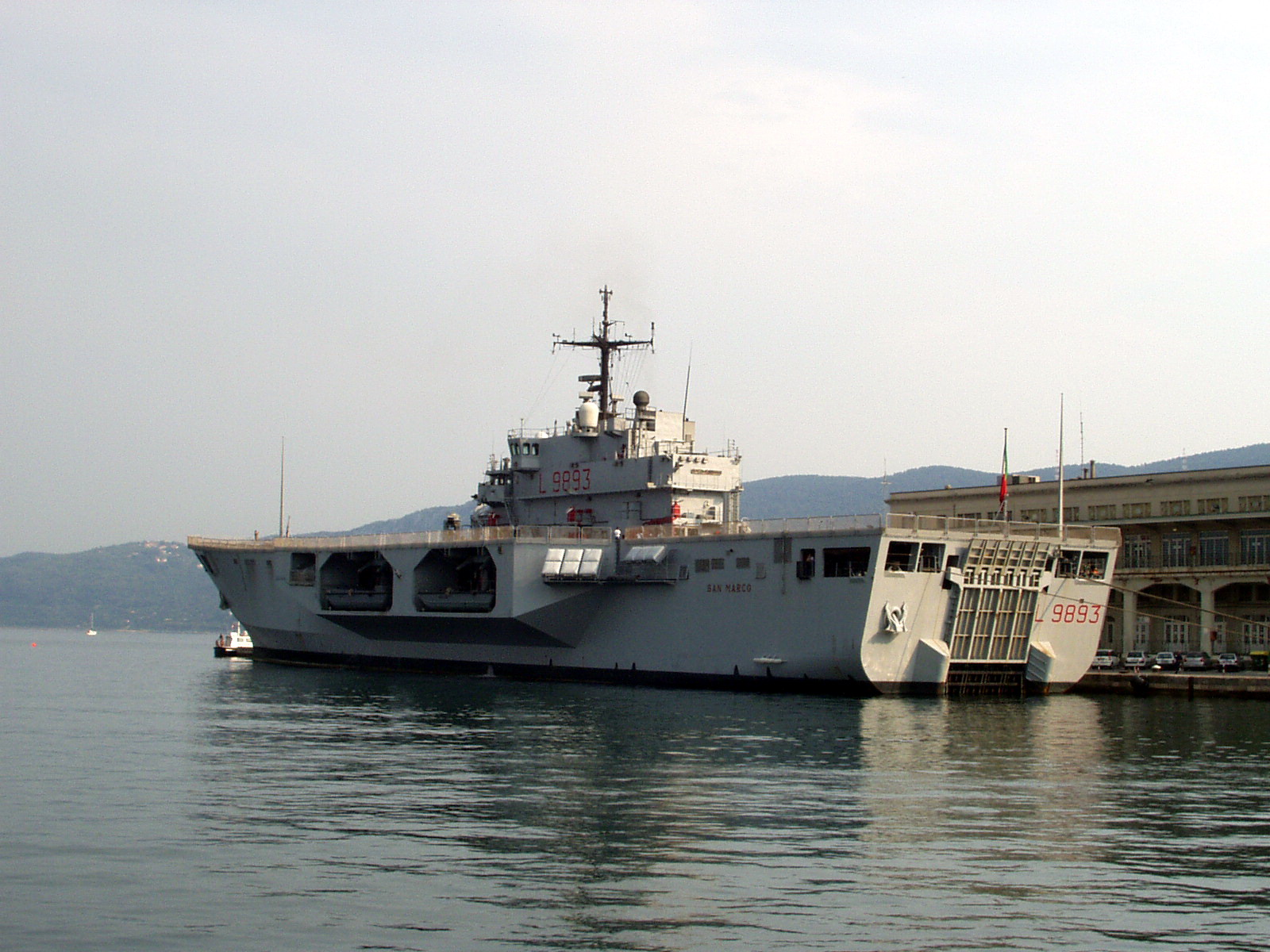 La nave d'assalto anfibio "San Marco" ormeggiata a Trieste